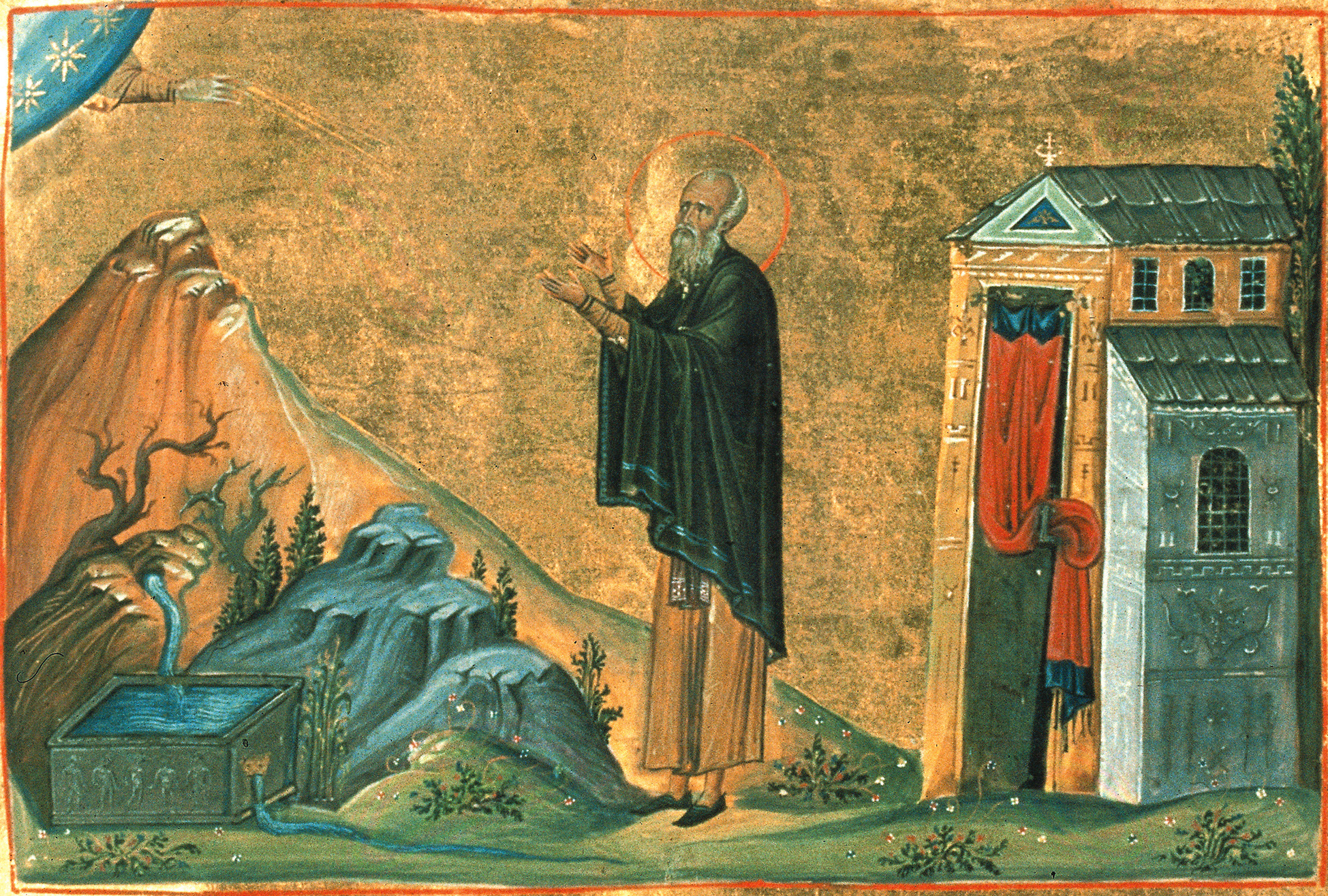 Аврамий Затворник, Хиданский, пресвитер, прп. Константинополь. 985 г. Миниатюра Минология Василия II. Ватиканская библиотека. Рим.